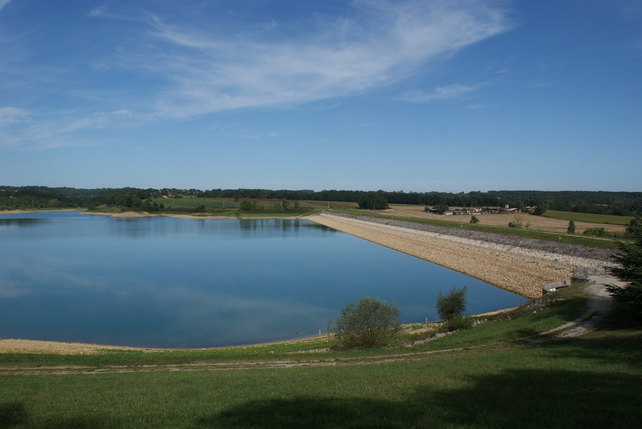 Foto van de dam aan de noordzijde van het Lac de la Gimone in de Gers (Frankrijk).Genomen:06-09-2011.